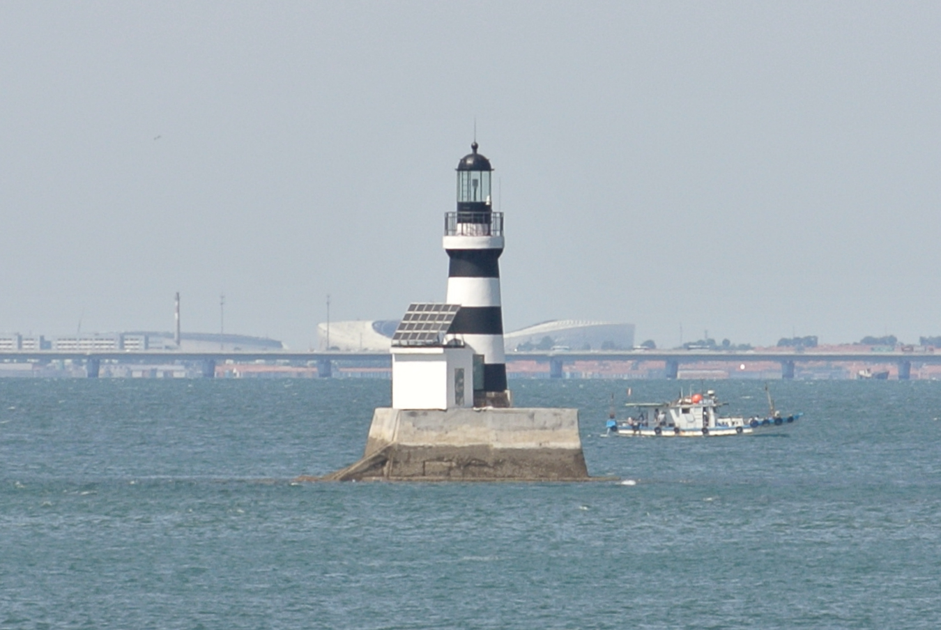 青岛马蹄礁灯塔